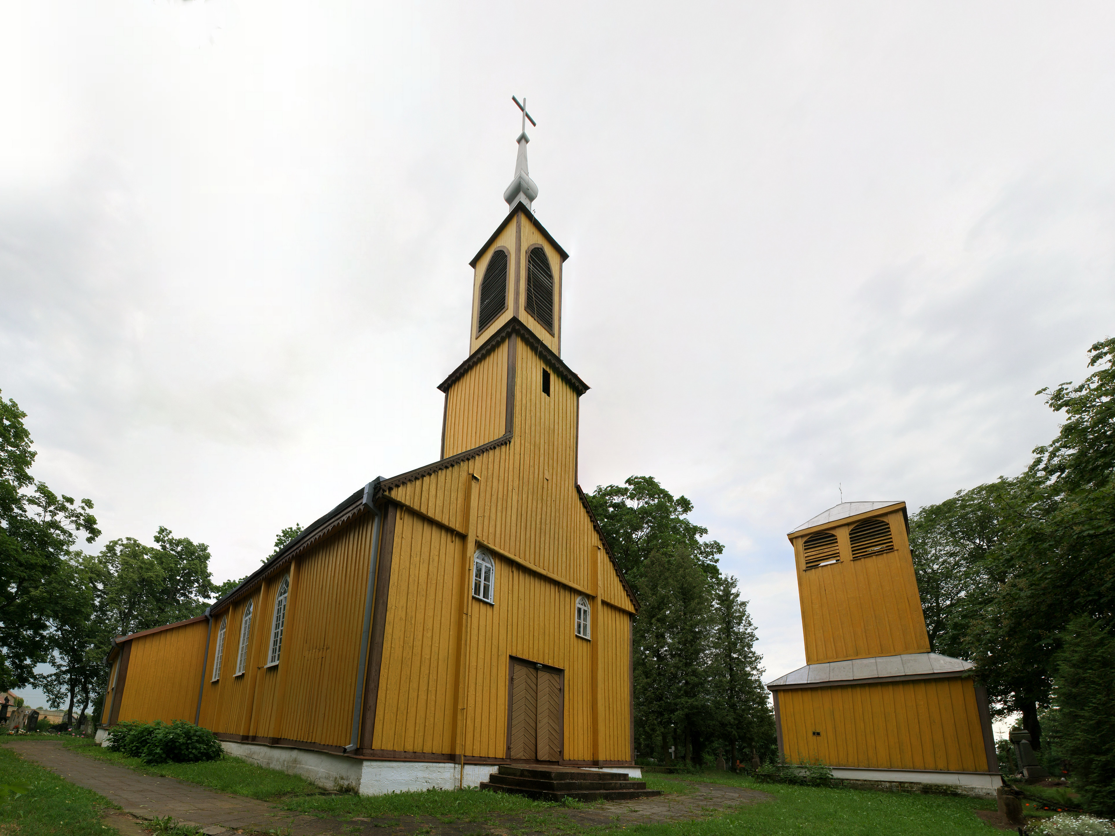 Pociūnėliai Church, Radviliškis district, Lithuania